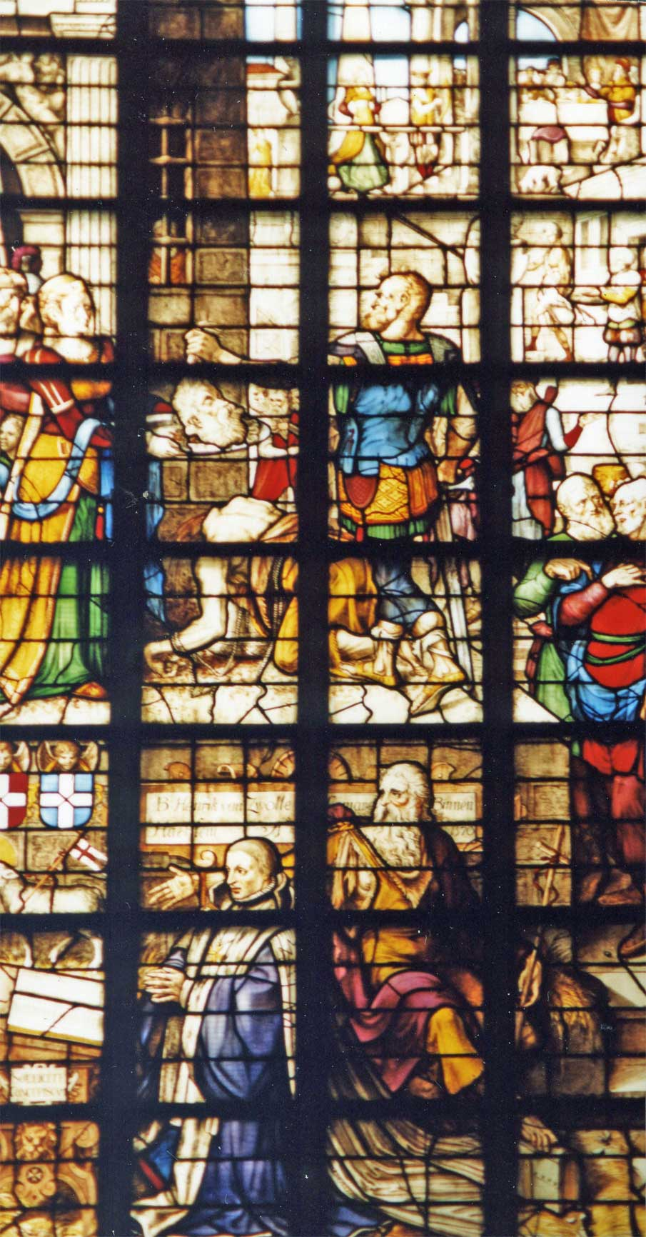 Glas 19 St. Janskerk te Gouda: de onthoofding van Johannes de doper; maker Willem Thybaut 1570